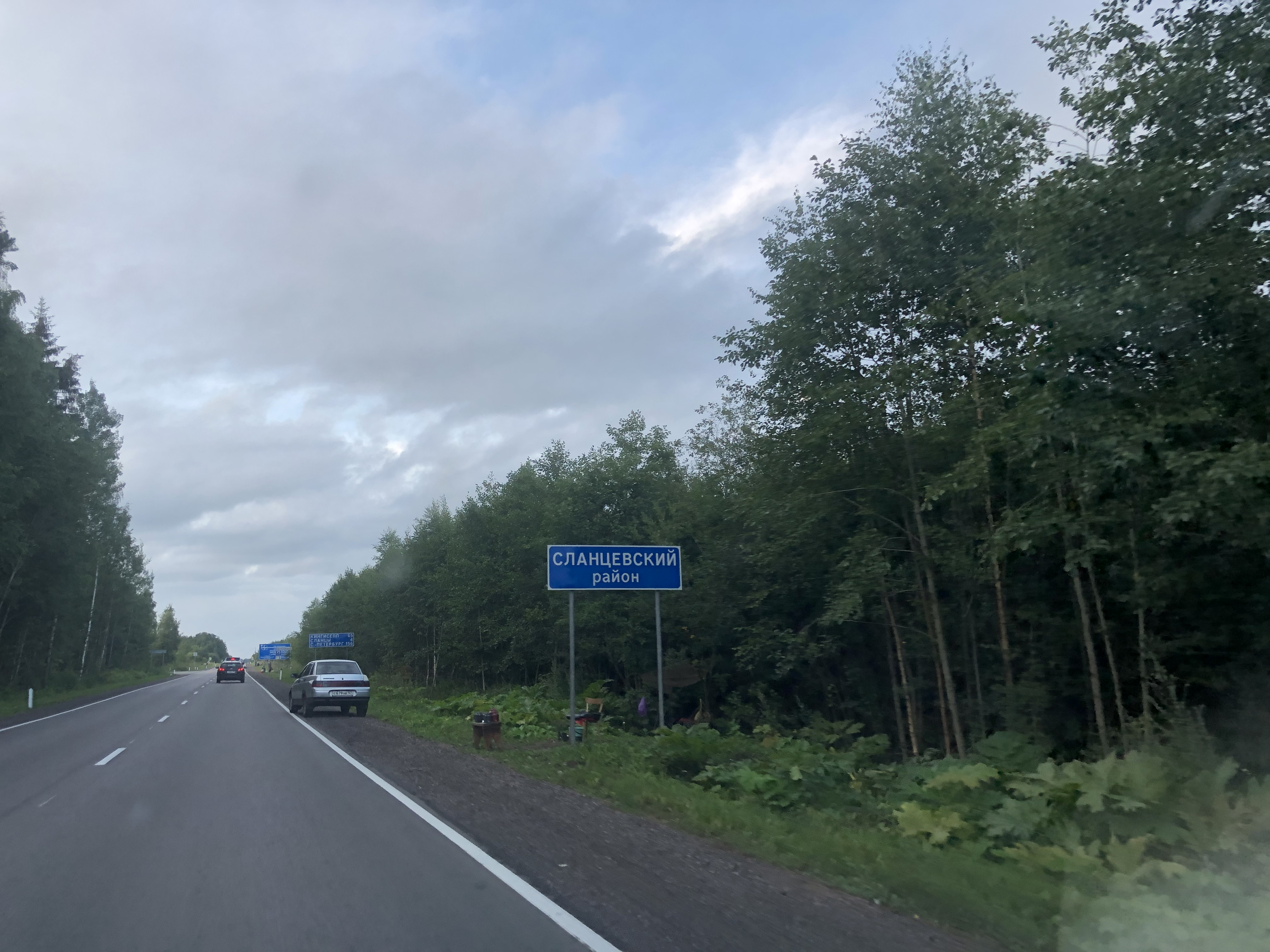 Граница с Псковской областью